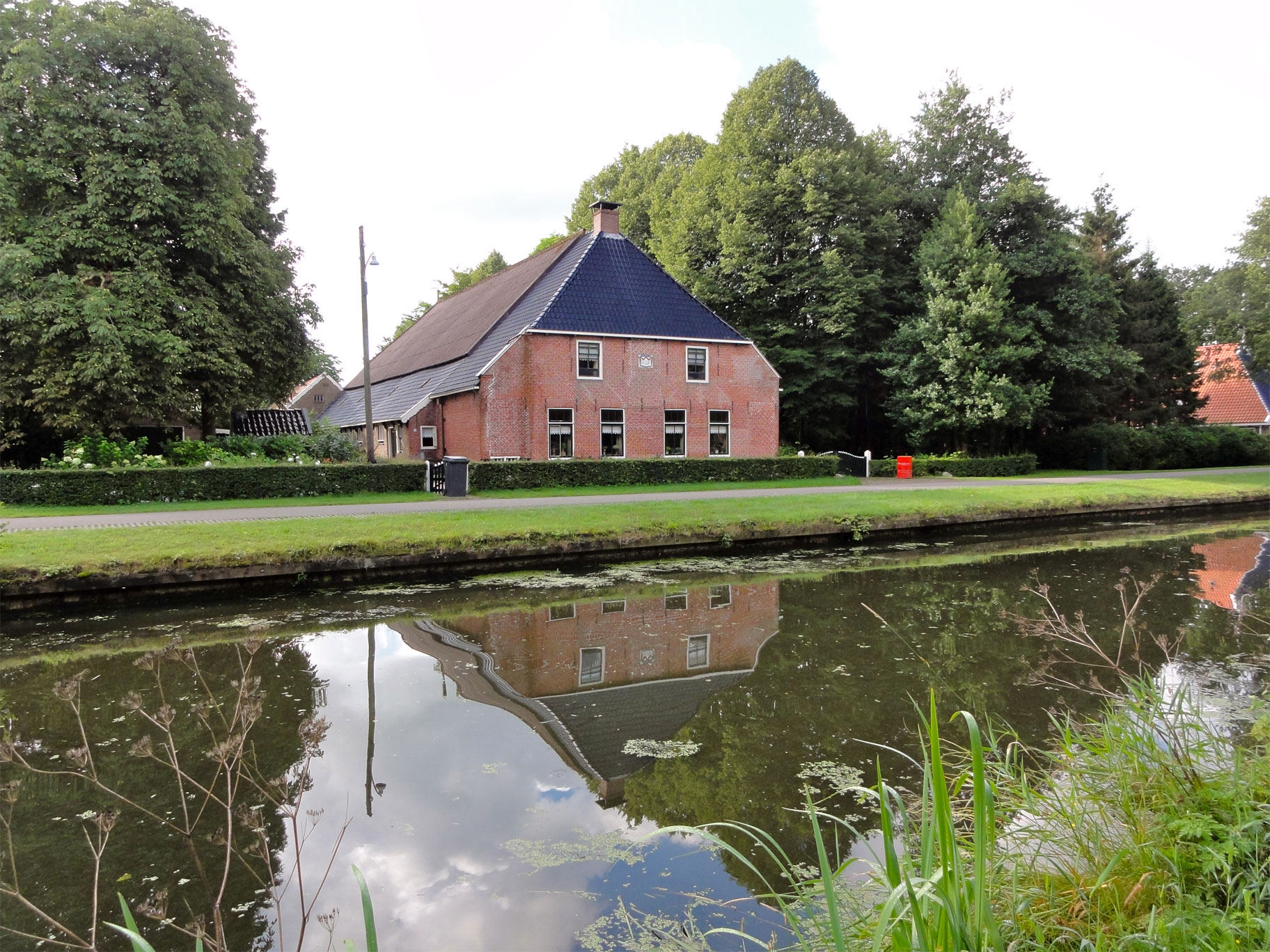 Boerderij aan de Opsterlandse Compagnonsvaart nabij Hemrikerverlaat